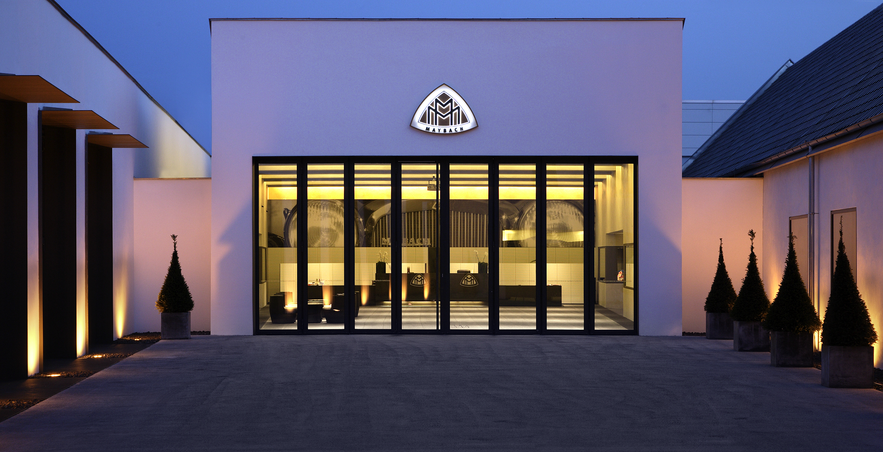 Museumsareal Innenhof